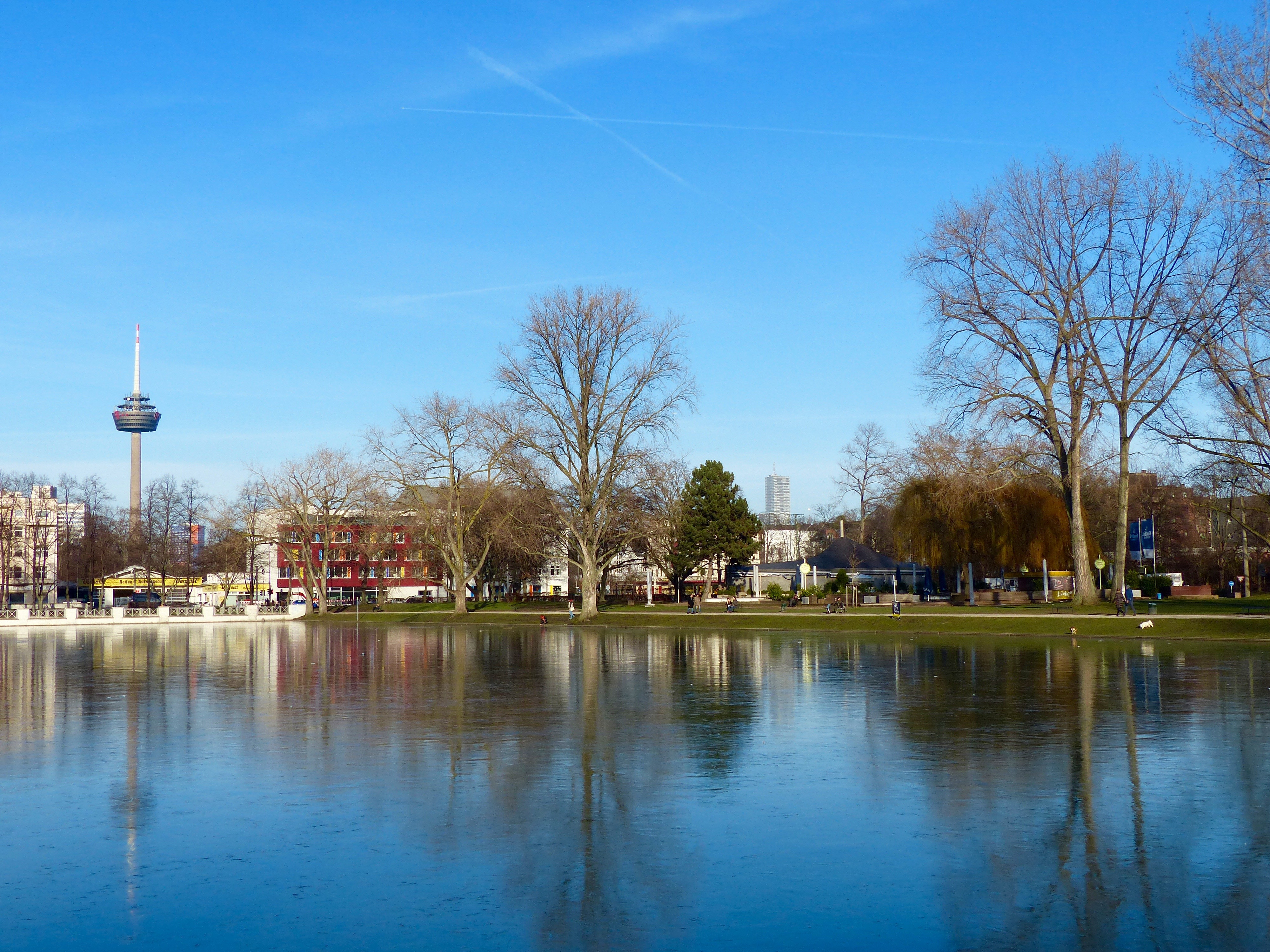 Aachener Weiher im Januar 2016